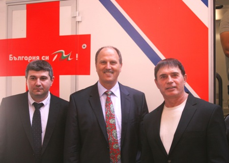 Димитър Куцаров с професор Норберт Гуткнехт и доктор Евгений Миронов